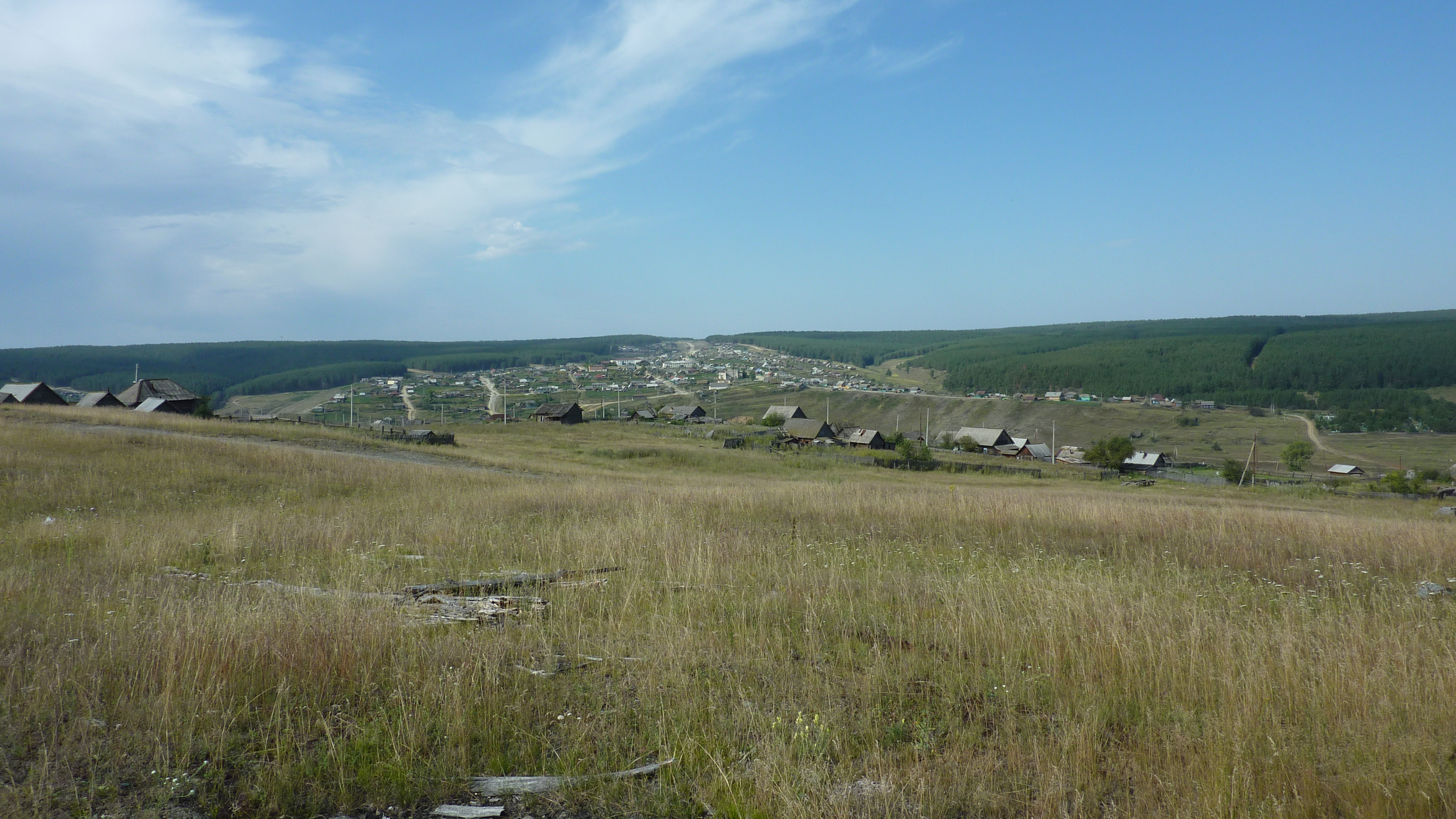 Вид на Кананикольское